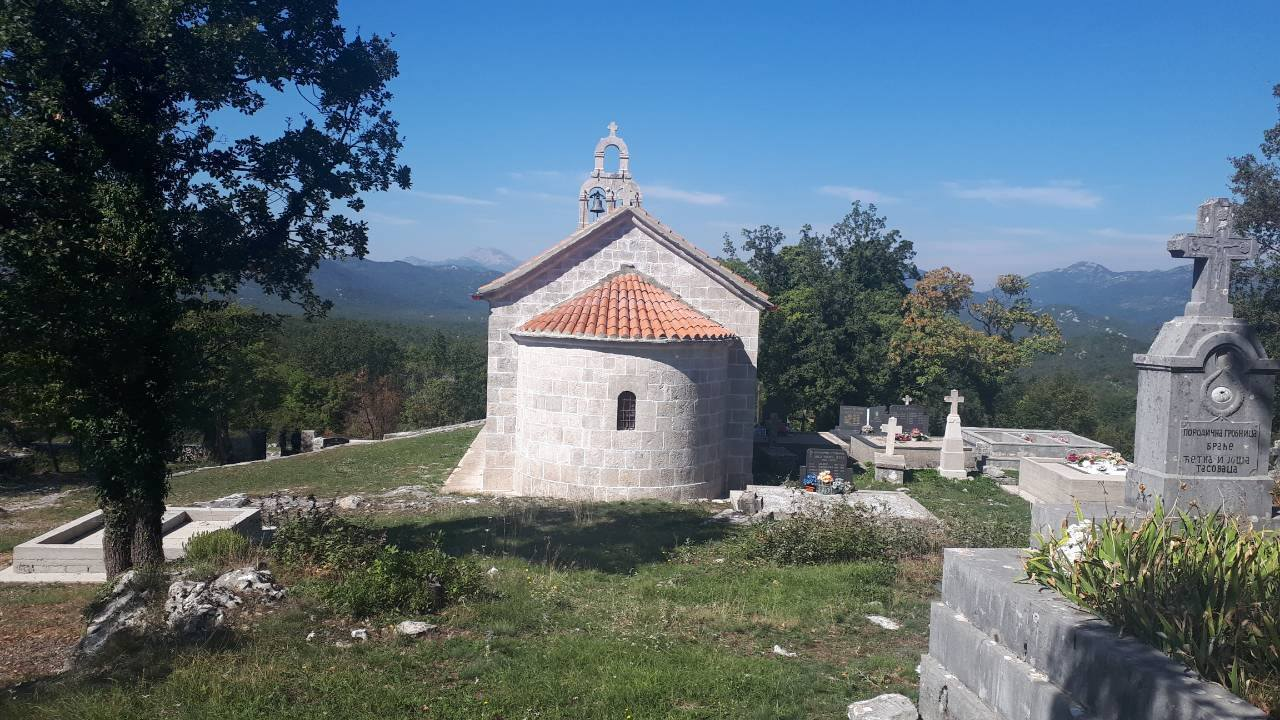 Храм Св. пророка Илије